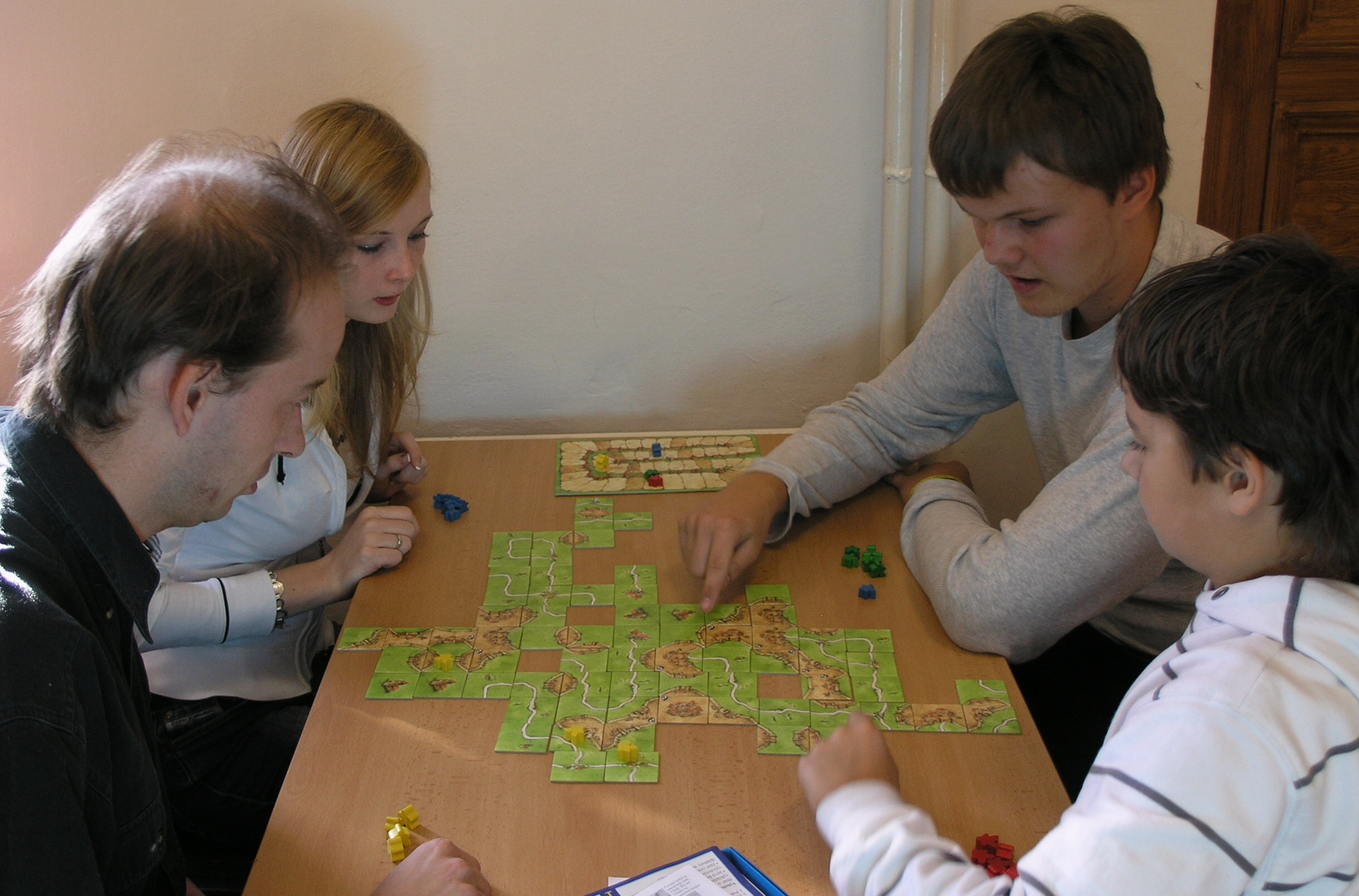 Deskohraní 2008